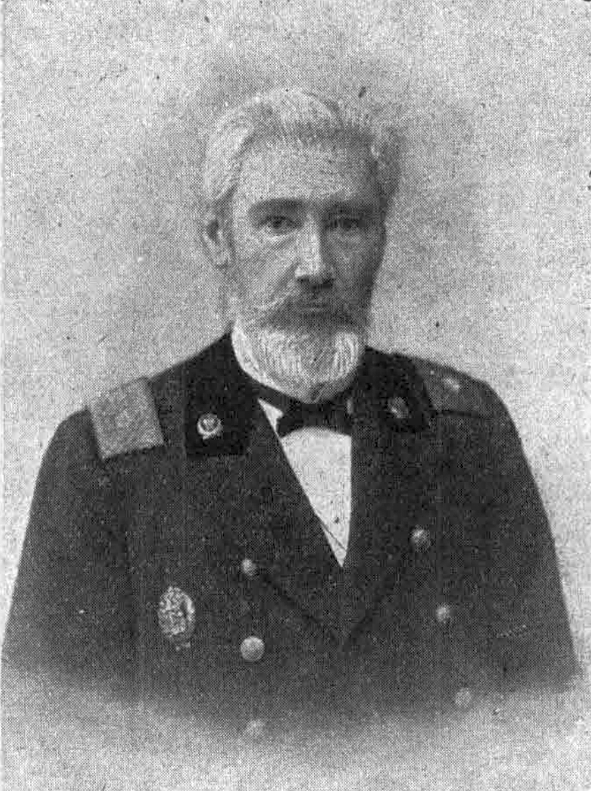 Шрётер, Виктор Александрович